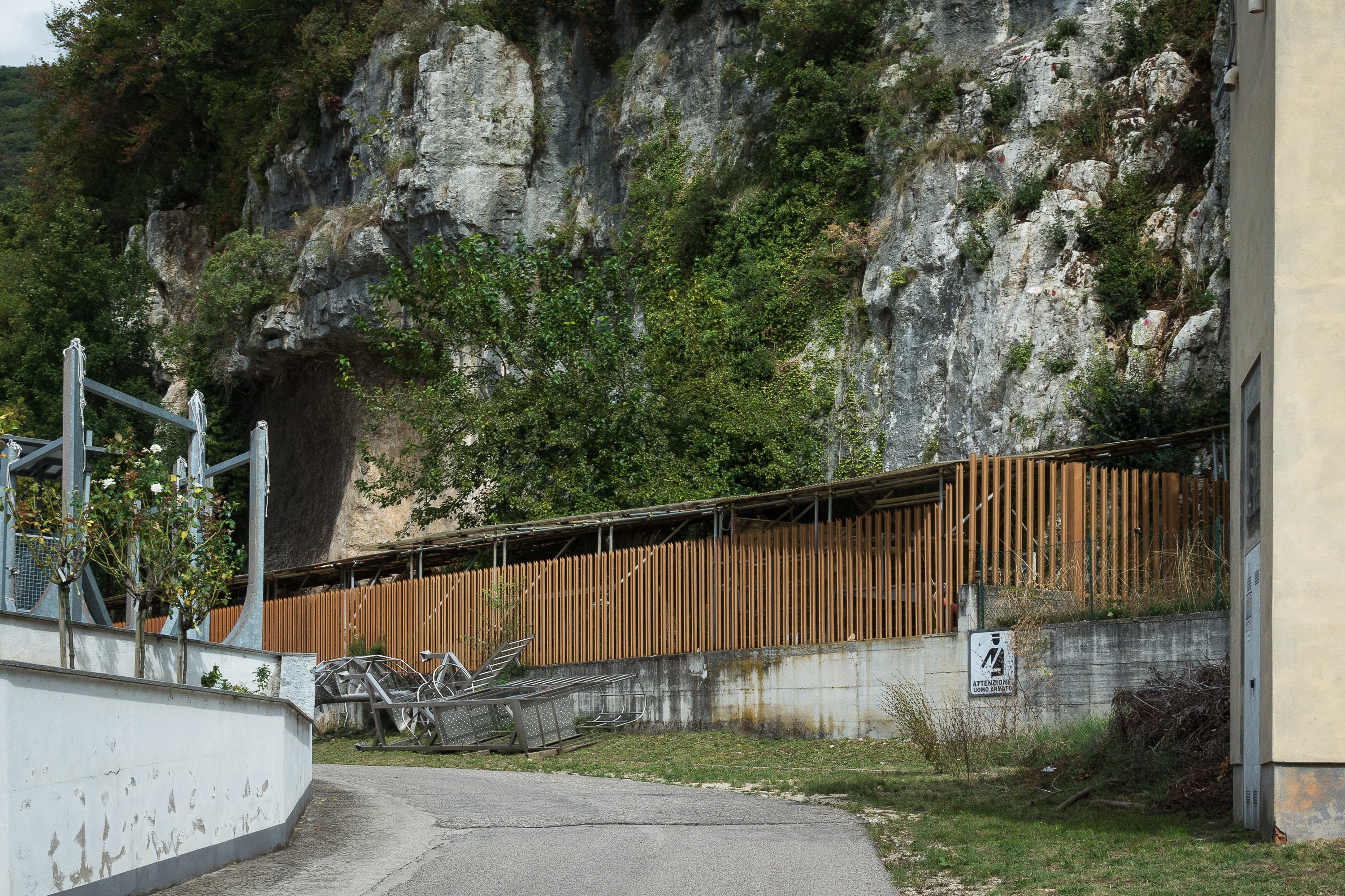 Der Riparo Tagliente in Stallavena di Grezzana.